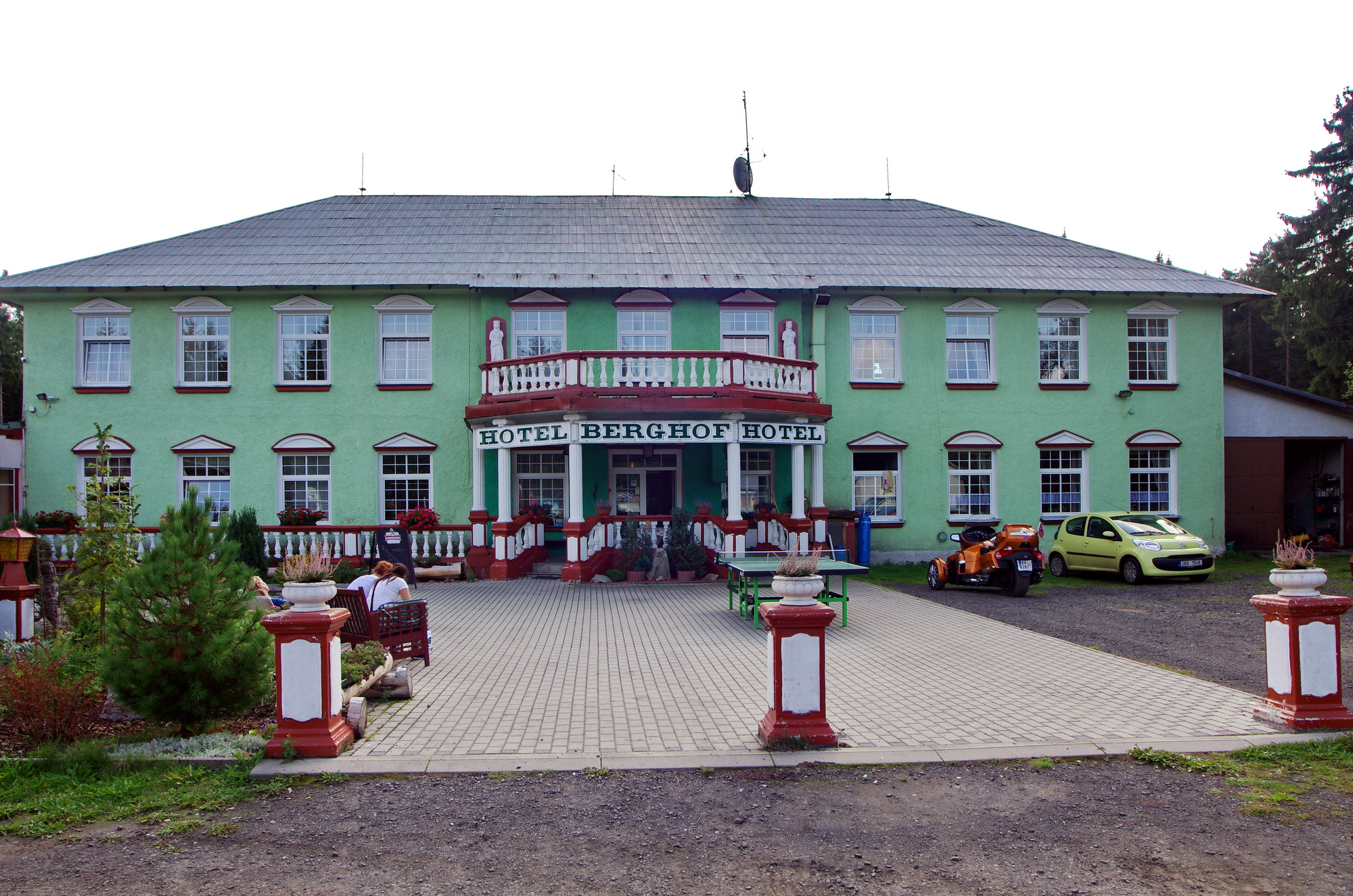 Jáchymov, Nové Město, hotel Berghof v místě bývalé šachty a lágru Rovnost I, Krušné hory, okres Karlovy Vary